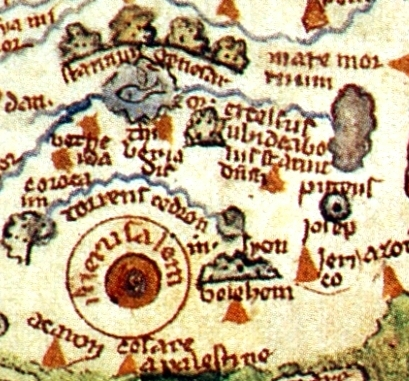 Psalter world map, Jerusalem